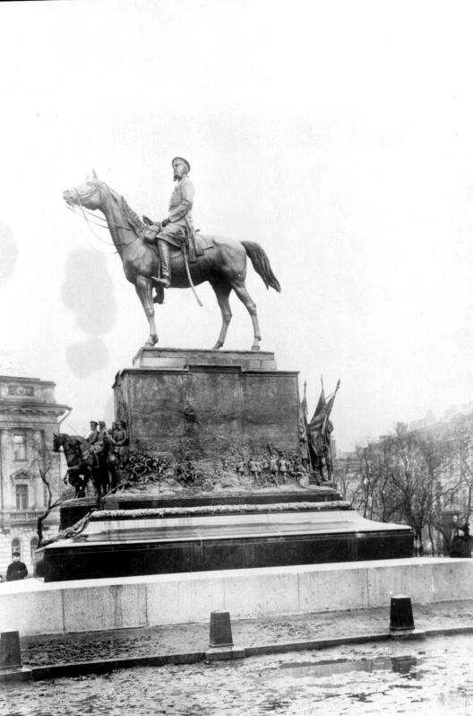 Памятник великому князю Николаю Николаевичу (Старшему) на Манежной площади. Фото 1914